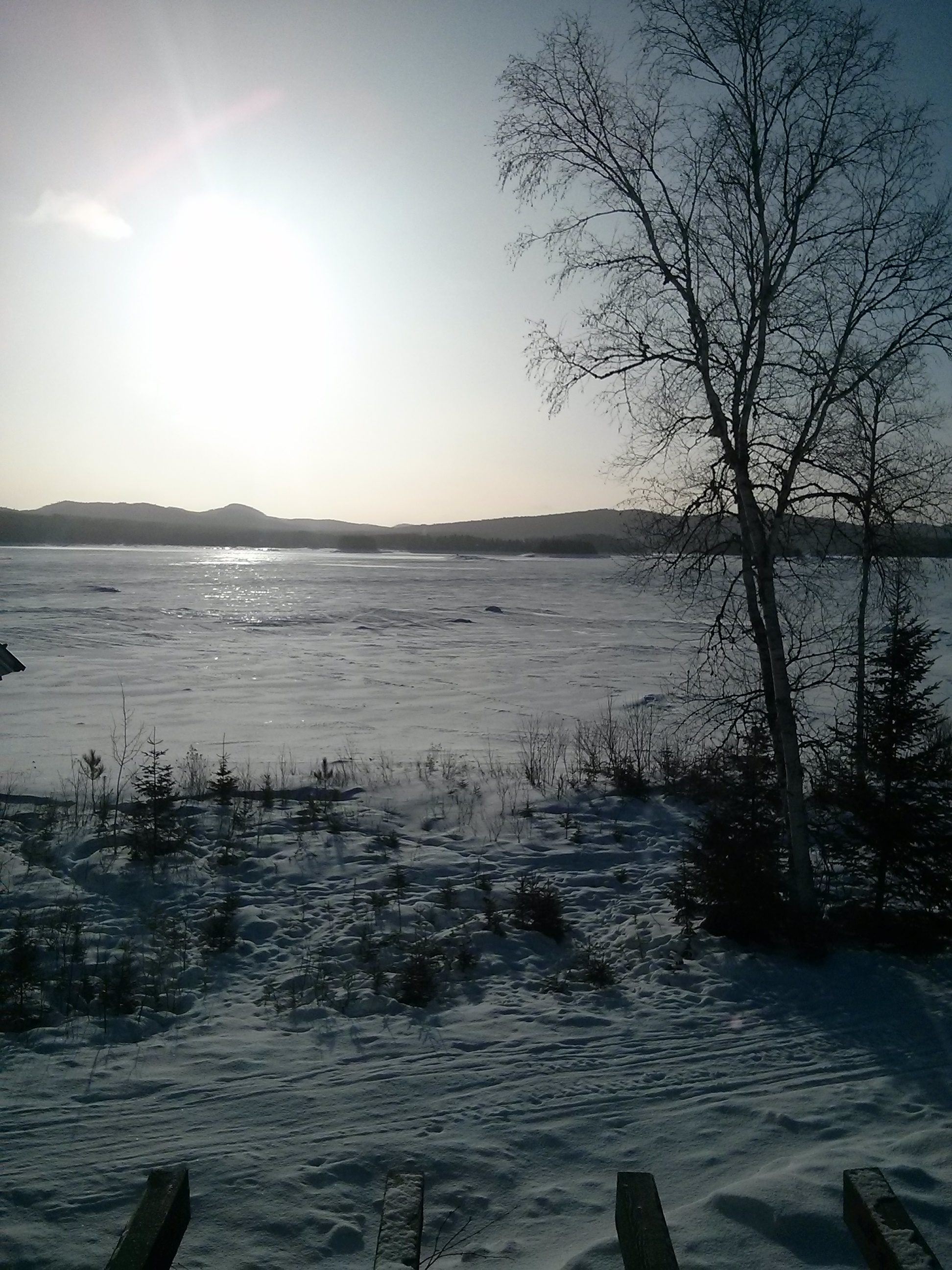 Le lac Taureau en janvier 2014